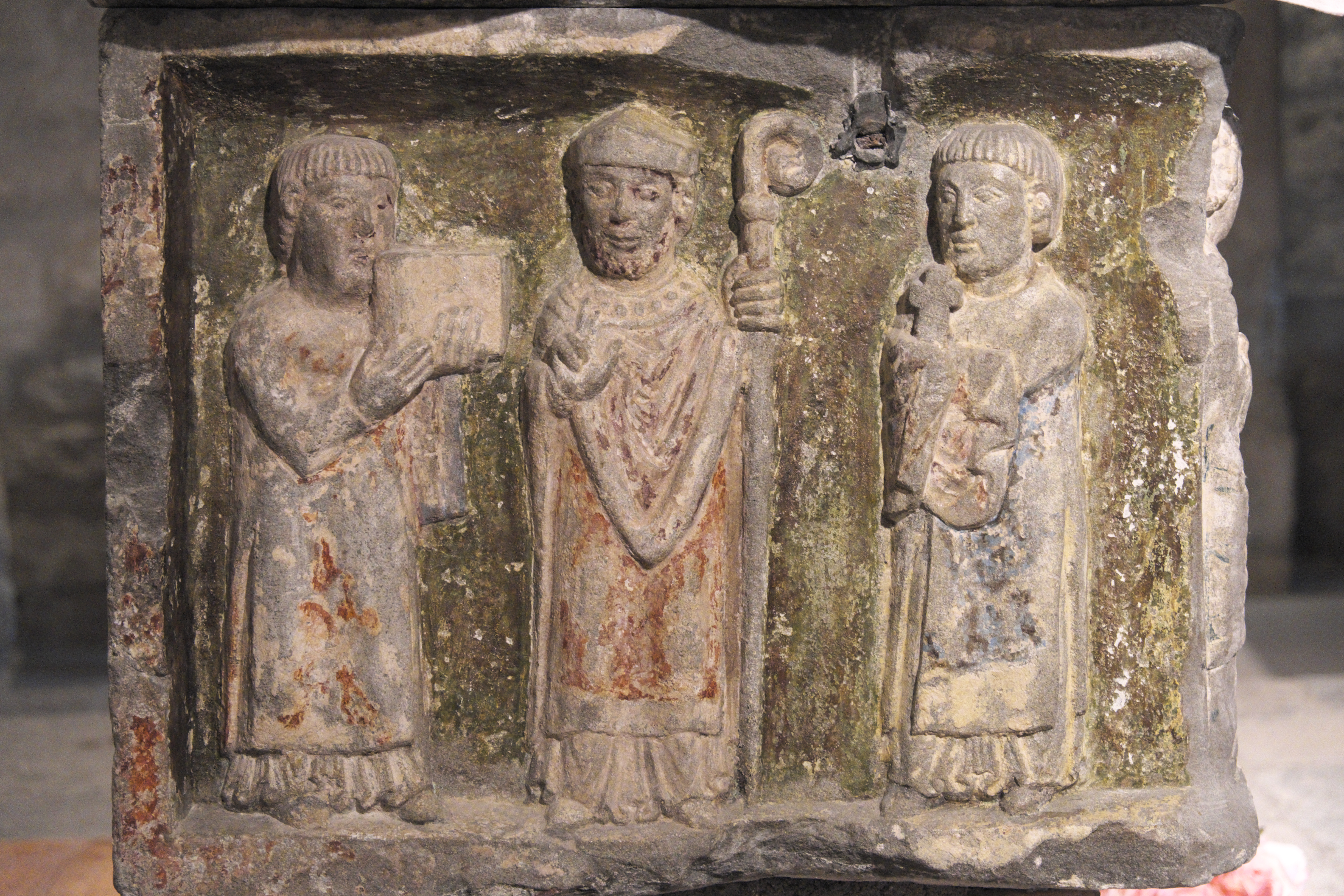 Kathedrale San Vicente in Roda de Isábena in der Provinz Huesca (Aragón/Spanien), Sarkophag des hl. Raimund von Roda